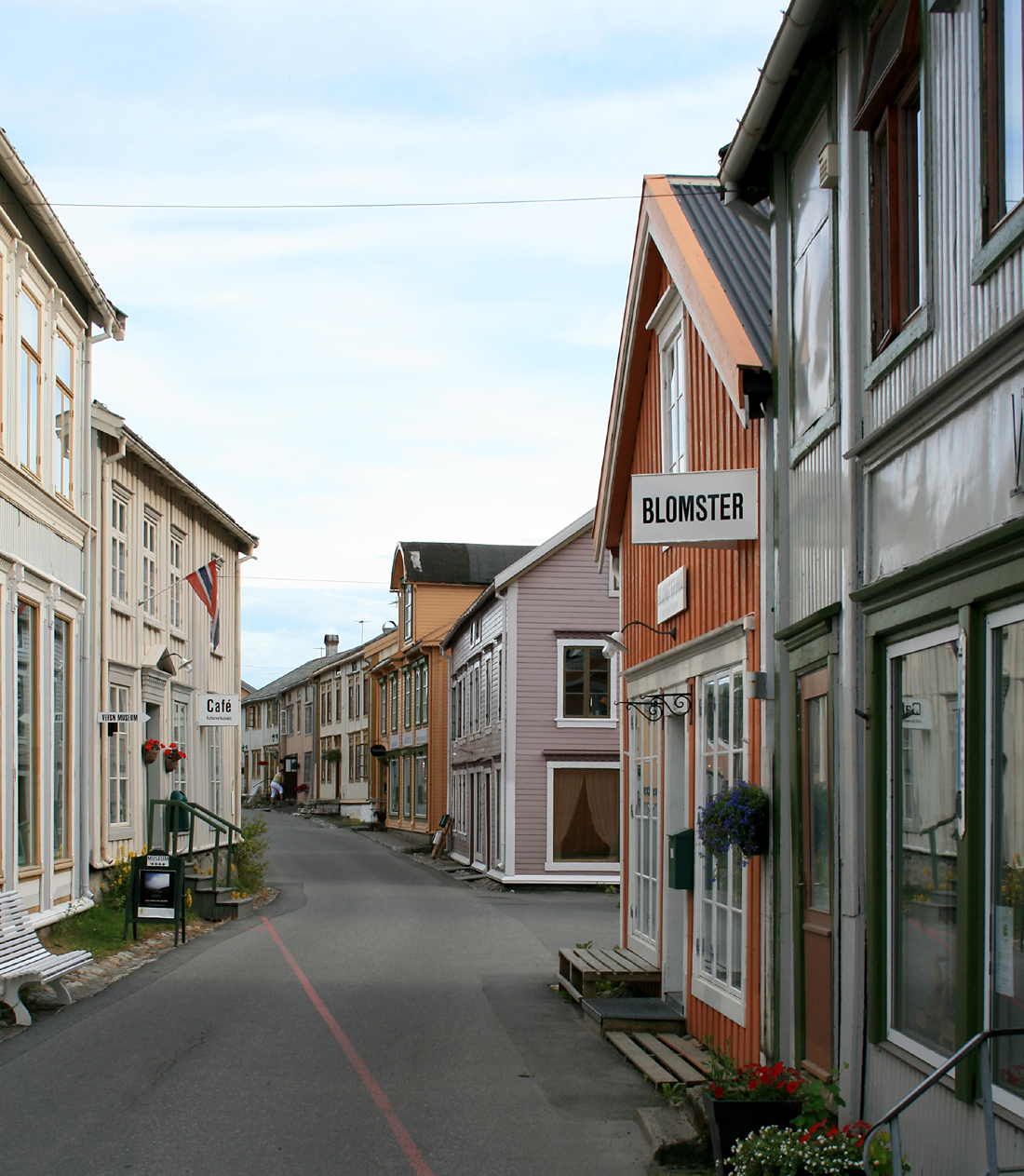 Sjøgata, Mosjøen, Norway.